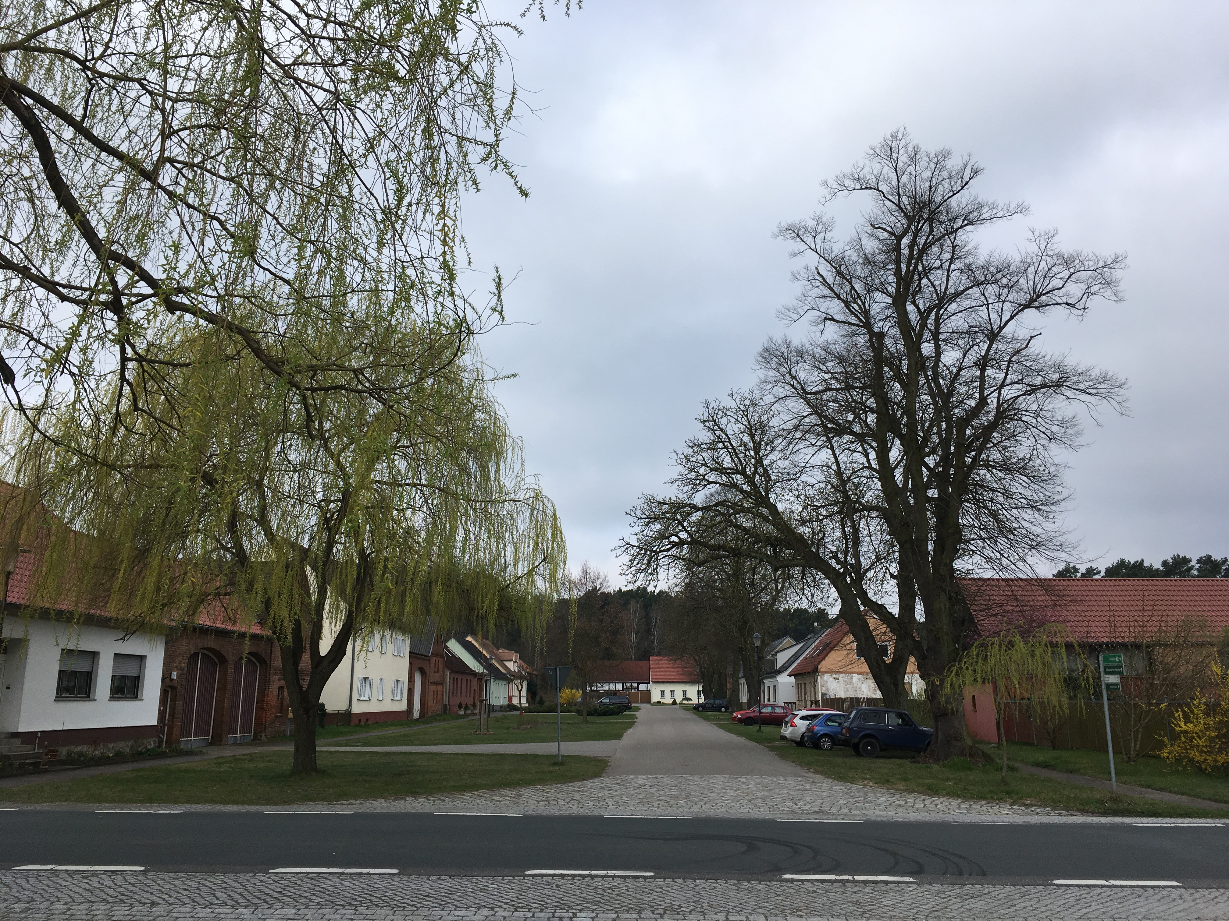 Klausdorf, ein Gemeindeteil des Ortsteils Bardenitz der Stadt Treuenbrietzen in Brandenburg